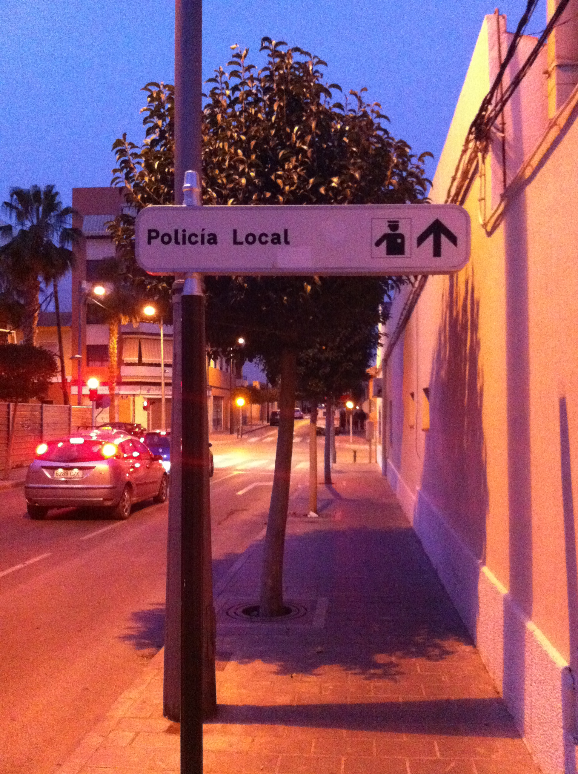 Указатель проезда к зданию полиции в Сан Висенте